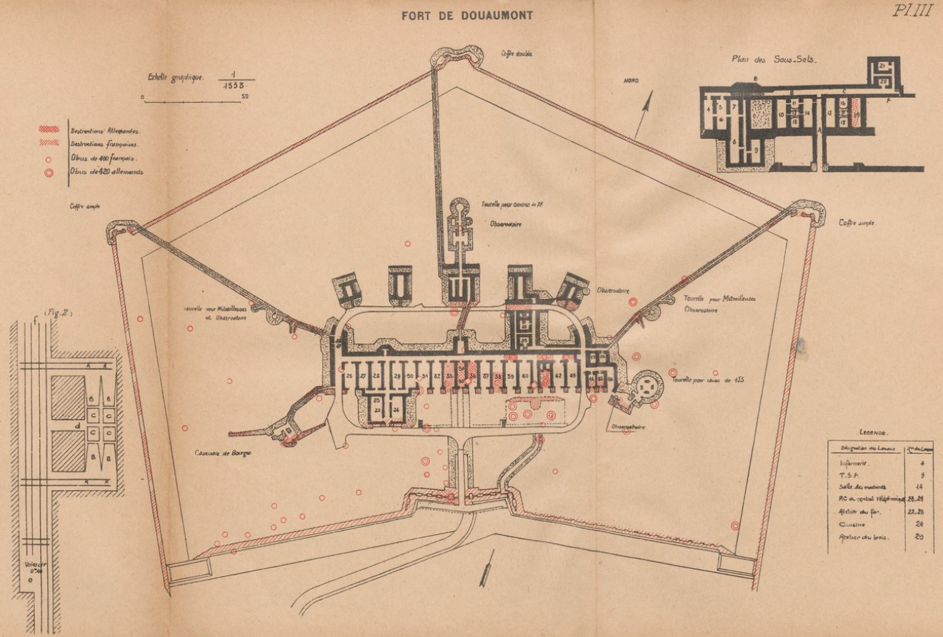 Plan du fort de Douaumont avec les principaux impacts d'obus (ceux de gros calibre) reçus en 1916.